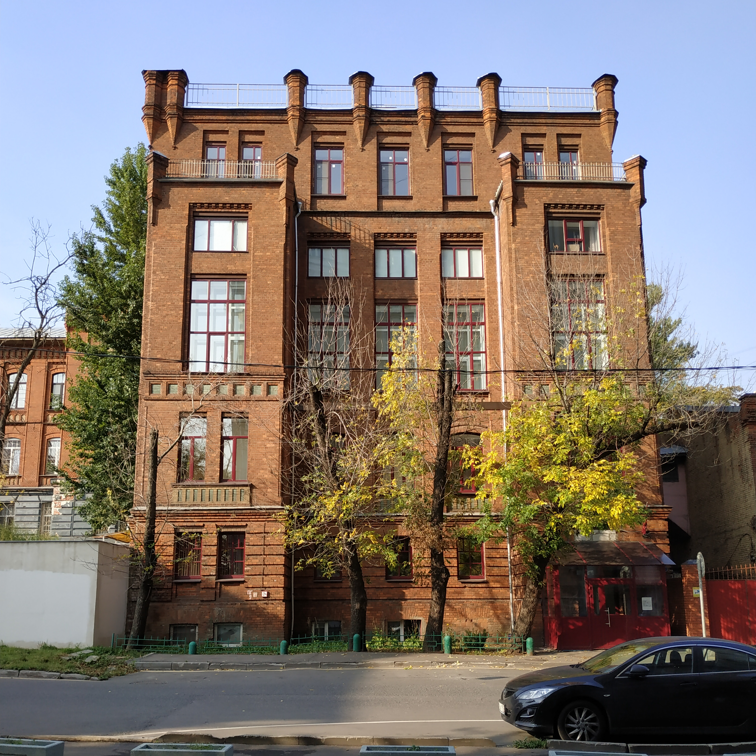 Отдел исследований мозга НЦН РАМН